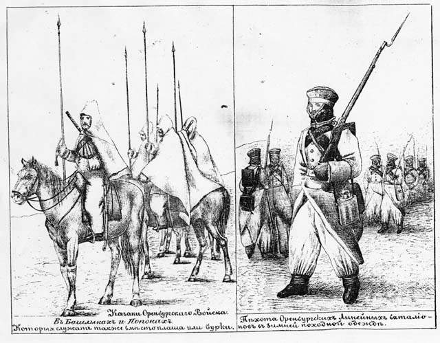 cossaks in Hiva 1839